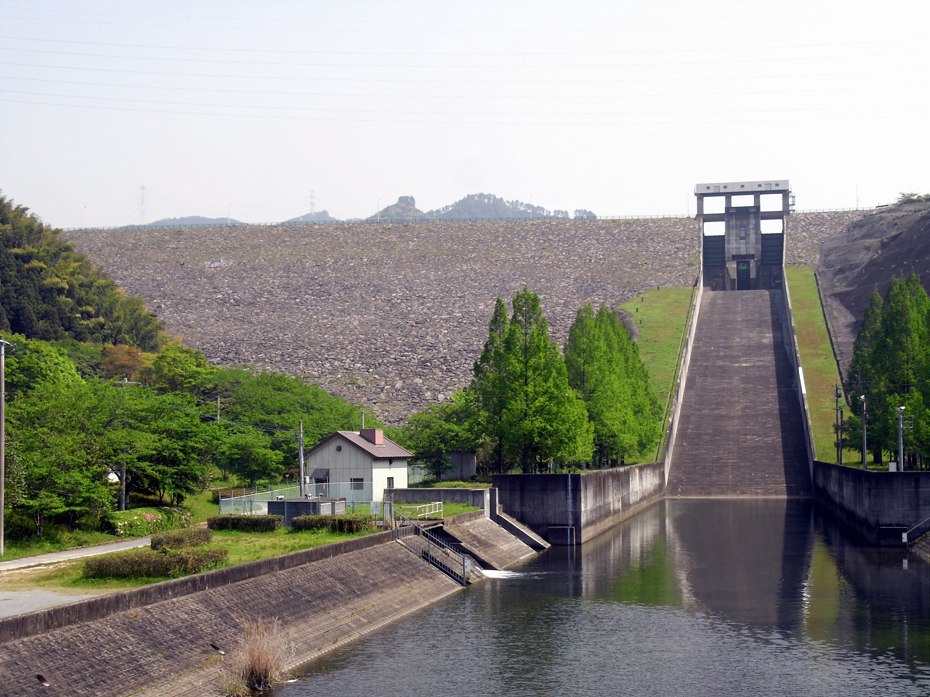 Dam